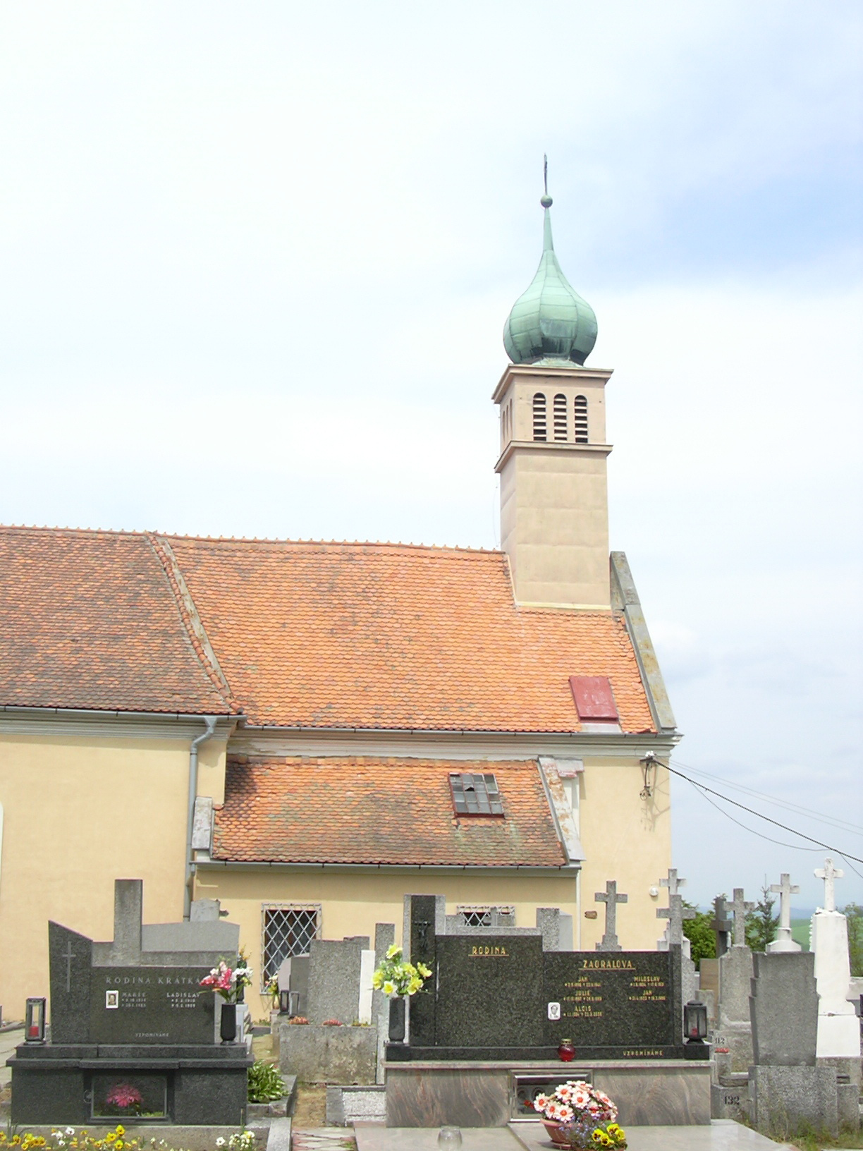 Kostel sv. Václava, Orlovice (Vyškov District - Czech Republic)